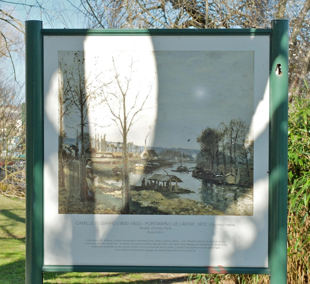 Port-Marly Le Lavoir, 2013